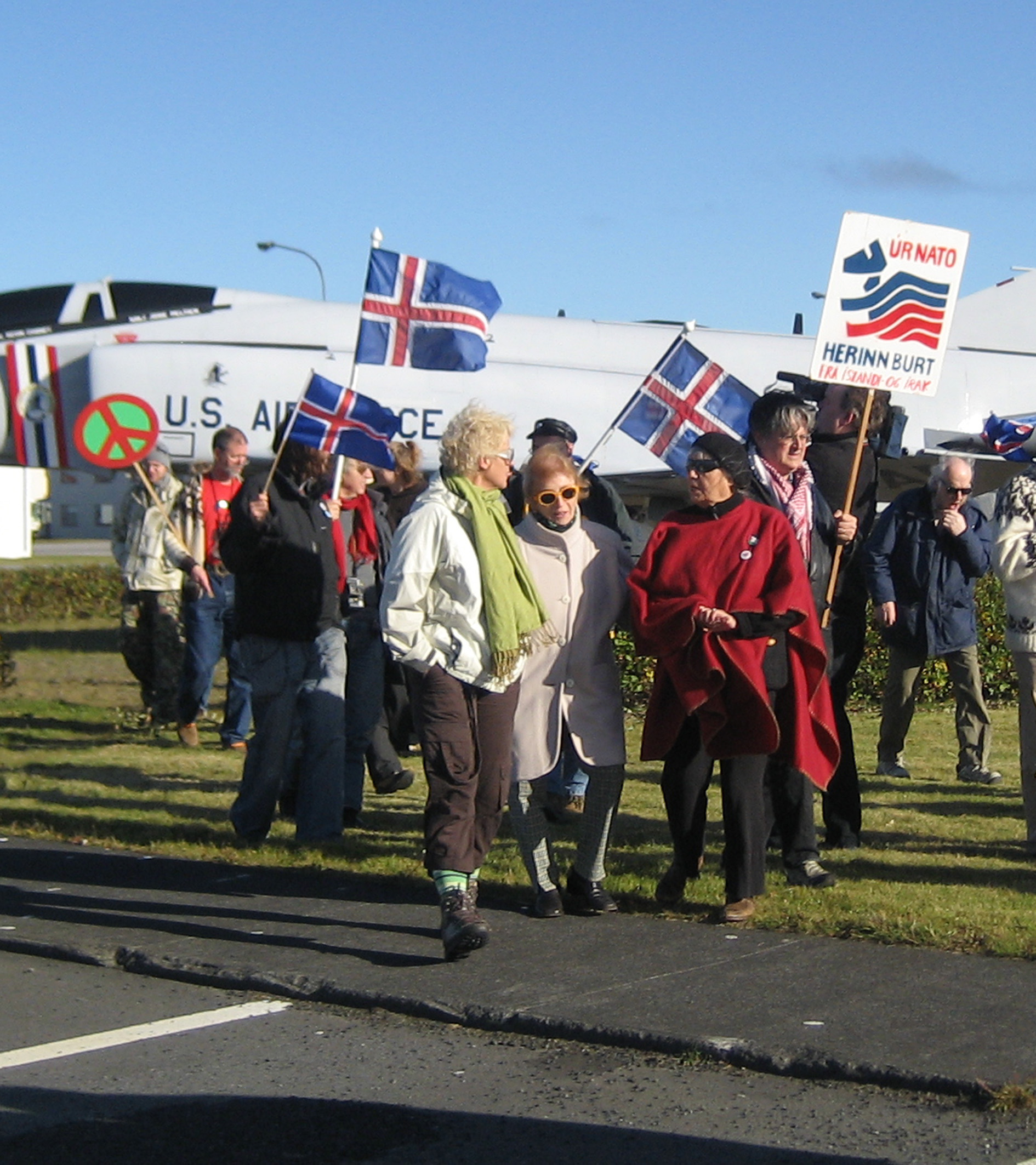 Herstöðvaandstæðingar fagna brottför bandaríska setuliðsins frá Íslandi með heimsókn í herstöðina á Miðnesheiði